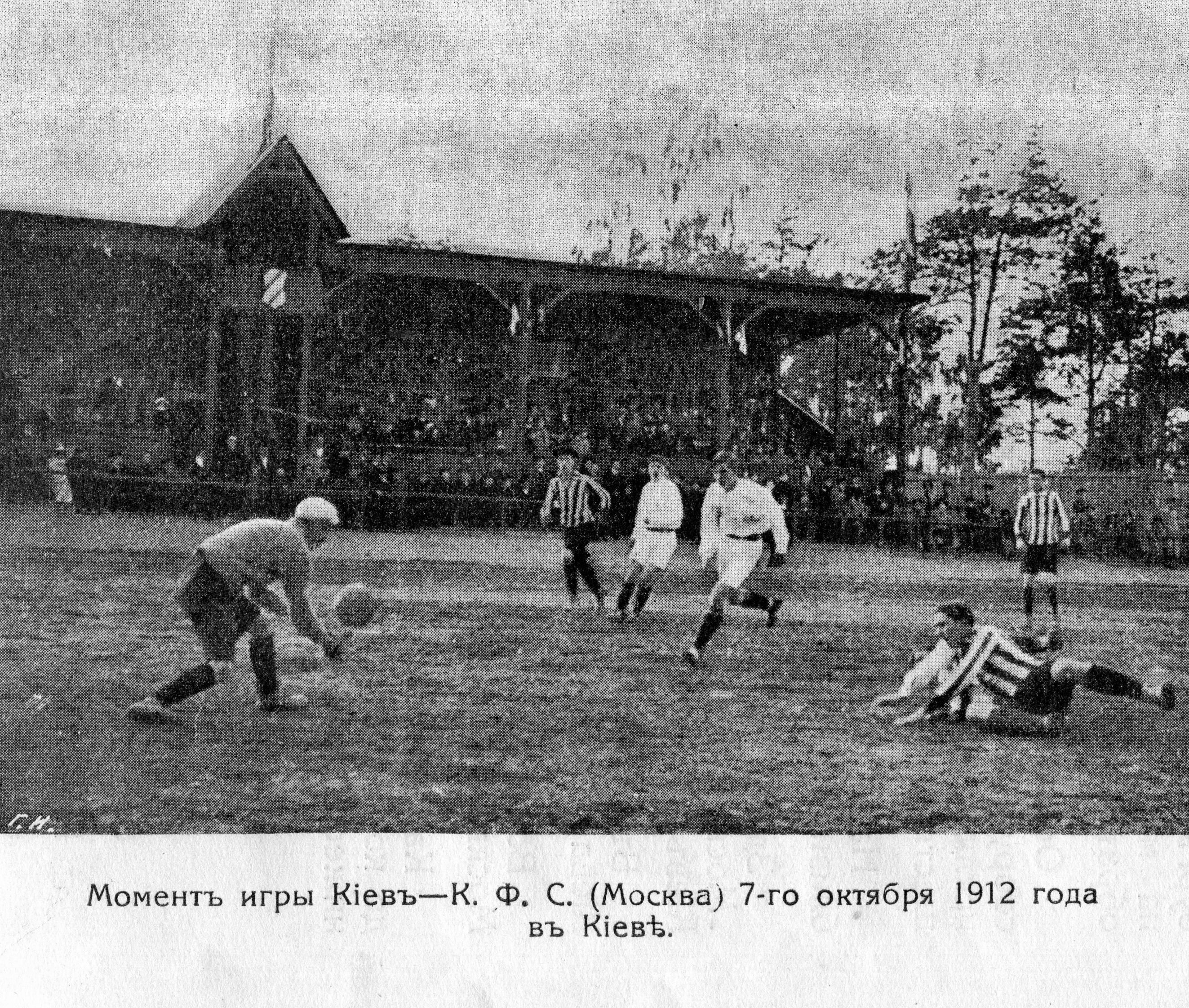 Игровой момент футбольного матча сб. Киева с клубом "КФС" (Москва) 7 октября 1912 г.